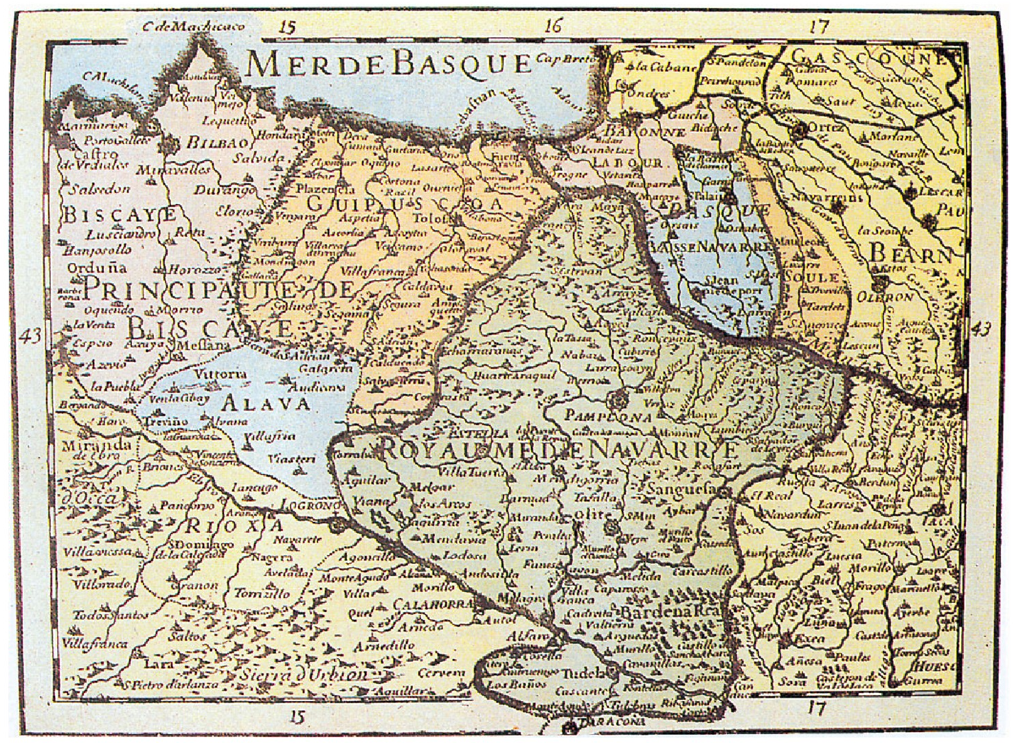 Euskal Herriko mapa, A. H. Jaillot-ek egina (XVIII. mendea).